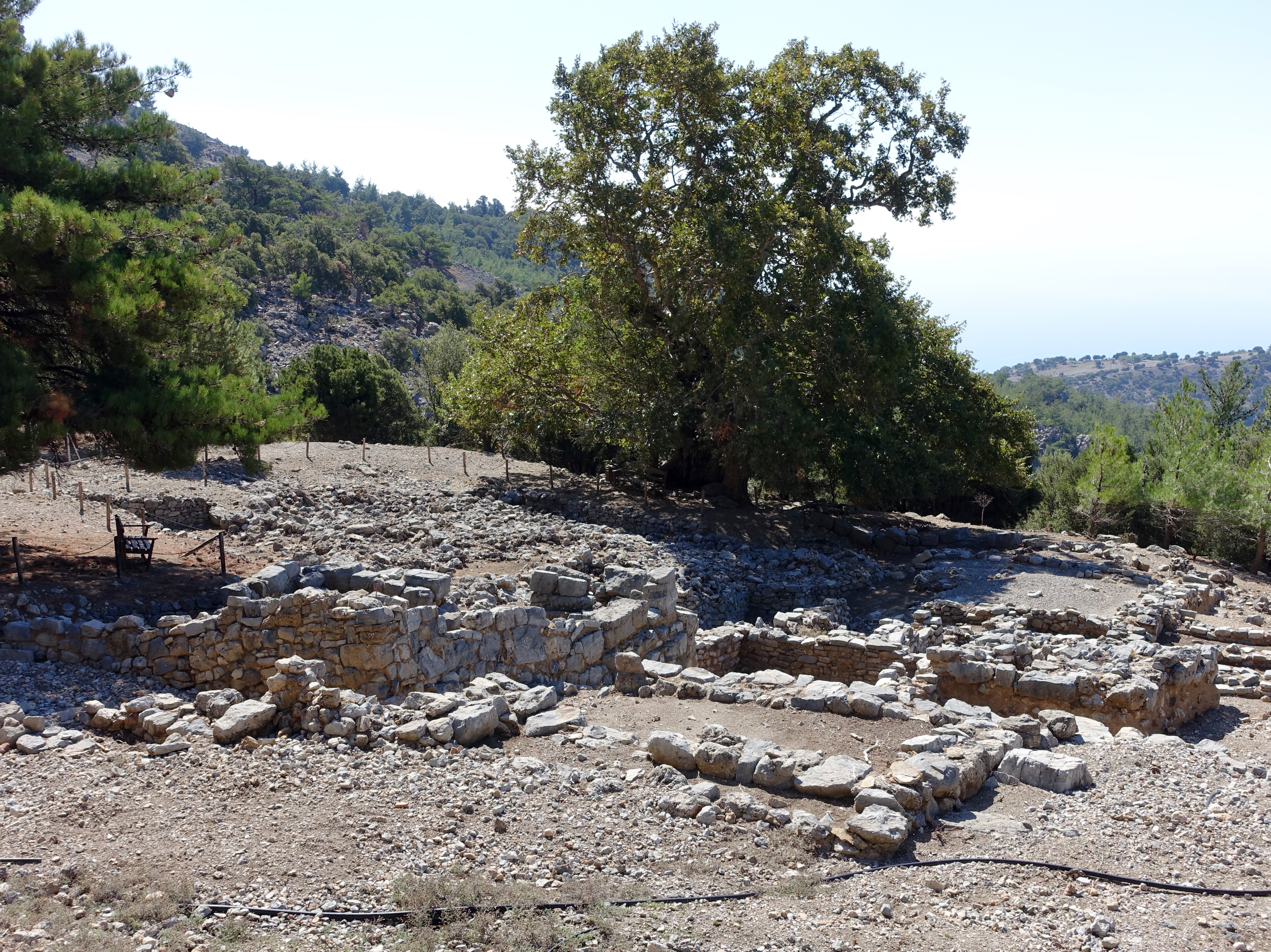 Heiligtum des Hermes und der Aphrodite oberhalb des Ortes Kato Symi (Κάτω Σύμη), Kreta, Griechenland